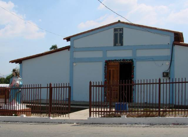 La Miel-Iglesia Maria Auxiliadora